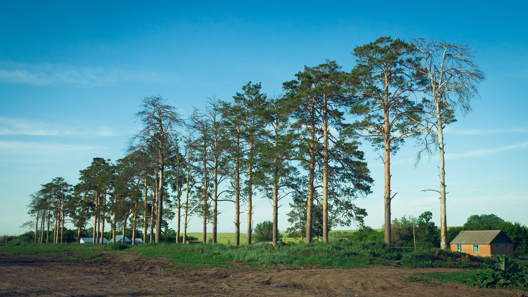 Назаровские сосны: Первомайский район, Оренбургская область This image is related to the protected area of Russia number 5610049